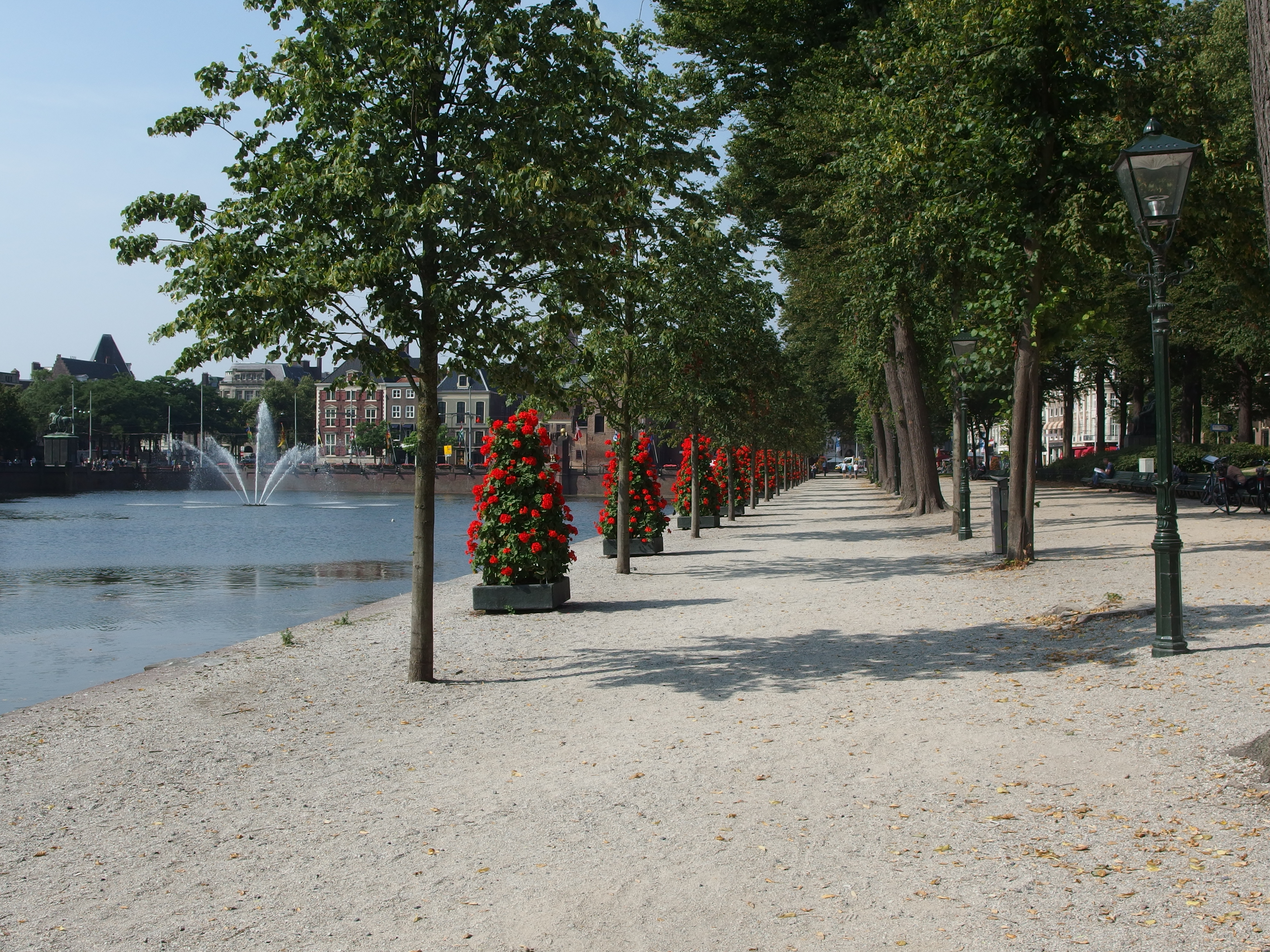 Hofvijver and Lange Vijverberg, The Hague